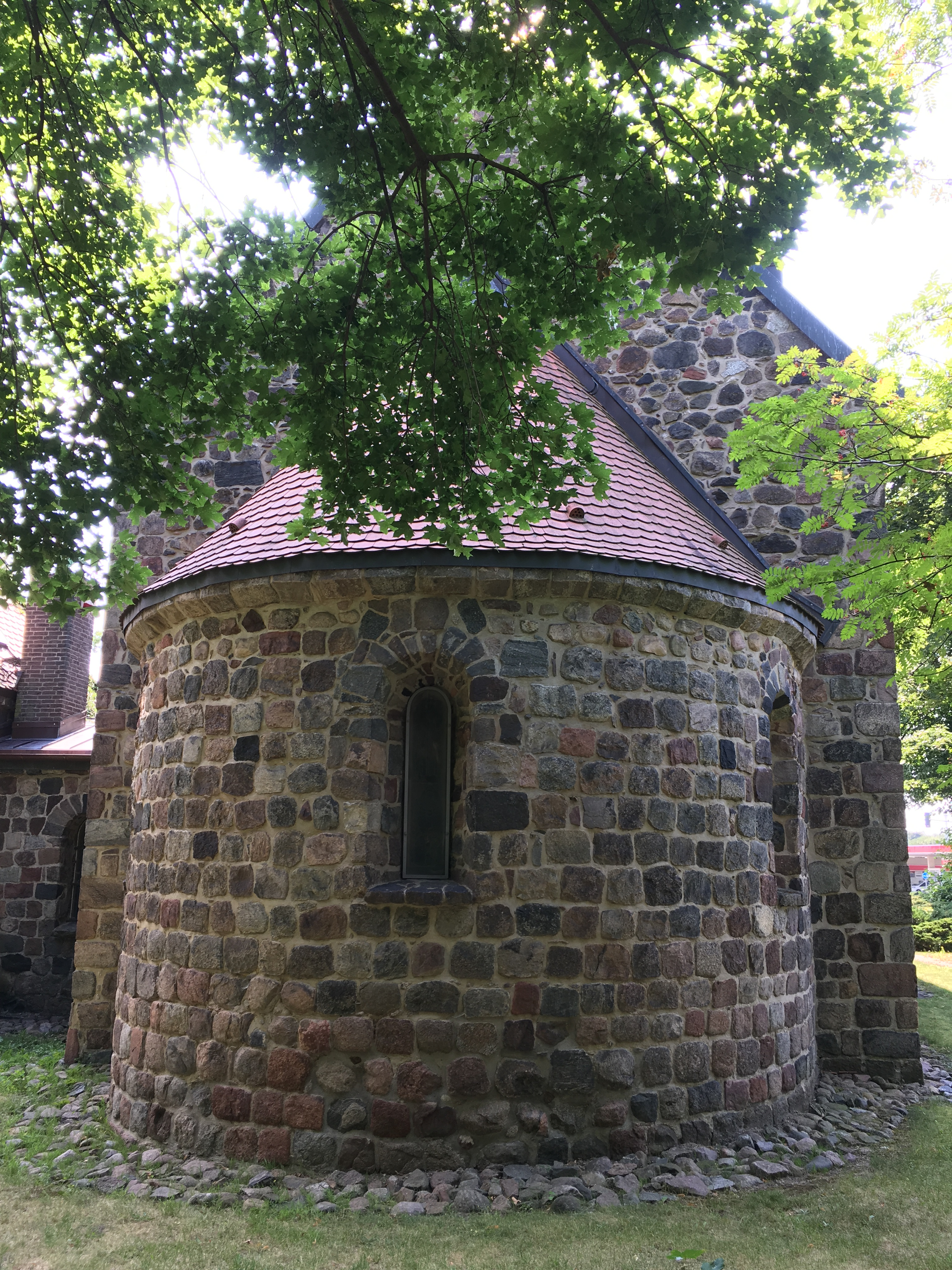 Die Dorfkirche Schönefeld im Landkreis Dahme-Spreewald ist eine spätromanische Saalkirche, die in den Jahren 1904 und 1905 umgebaut wurde.